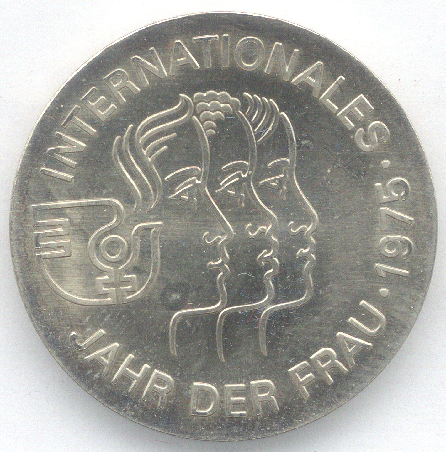 5 Mark DDR 1975 - Internationales Jahr der Frau - Bildseite